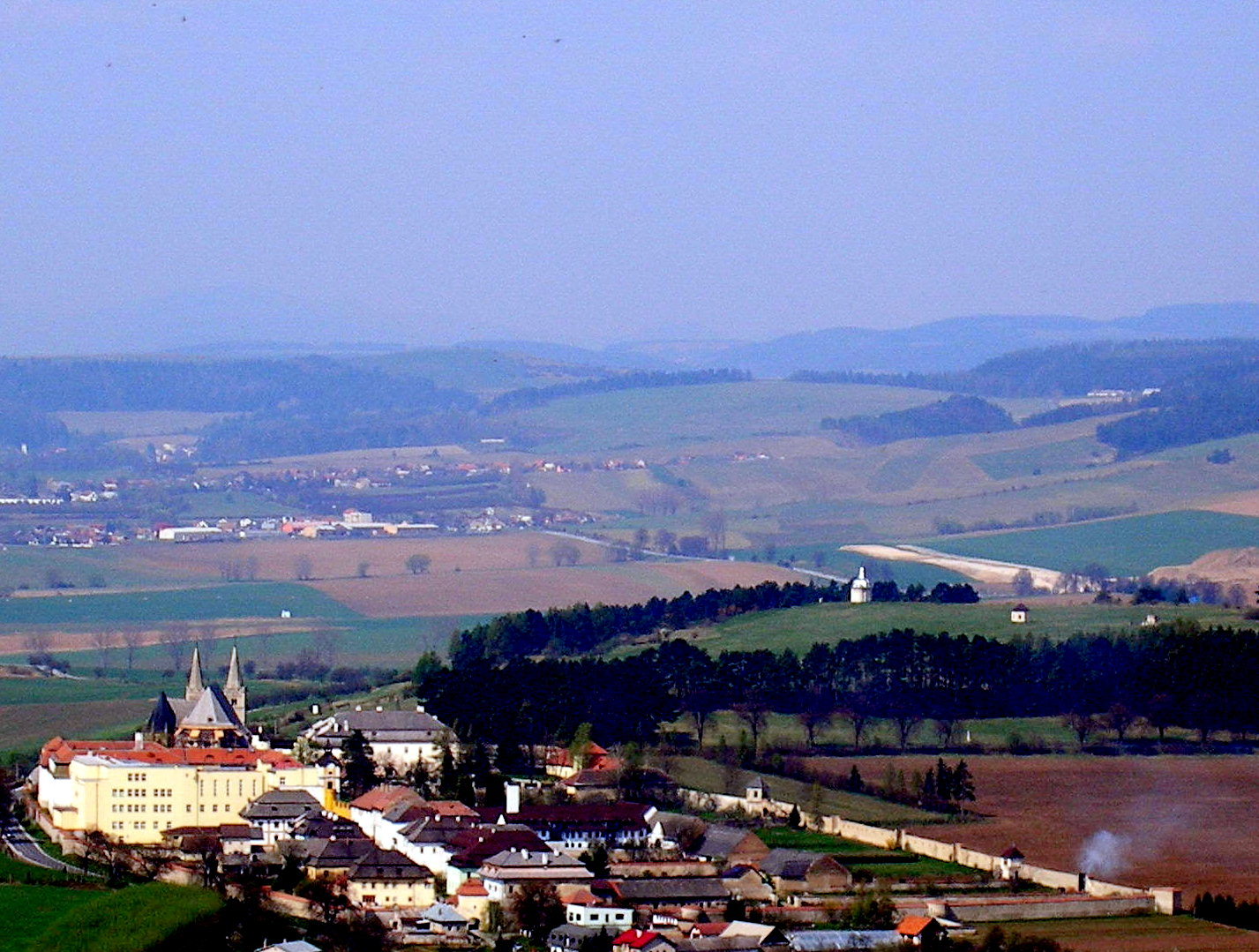 Pohľad zo Spišského hradu. Na obrázku vľavo v popredí komplex Spišská Kapitula. Vpravo planina Pažica a lokalita Spišský Jeruzalem. Mesto Spišské Podhradie. Vzadu obce Nemešany, Klčov, Spišský Hrhov.